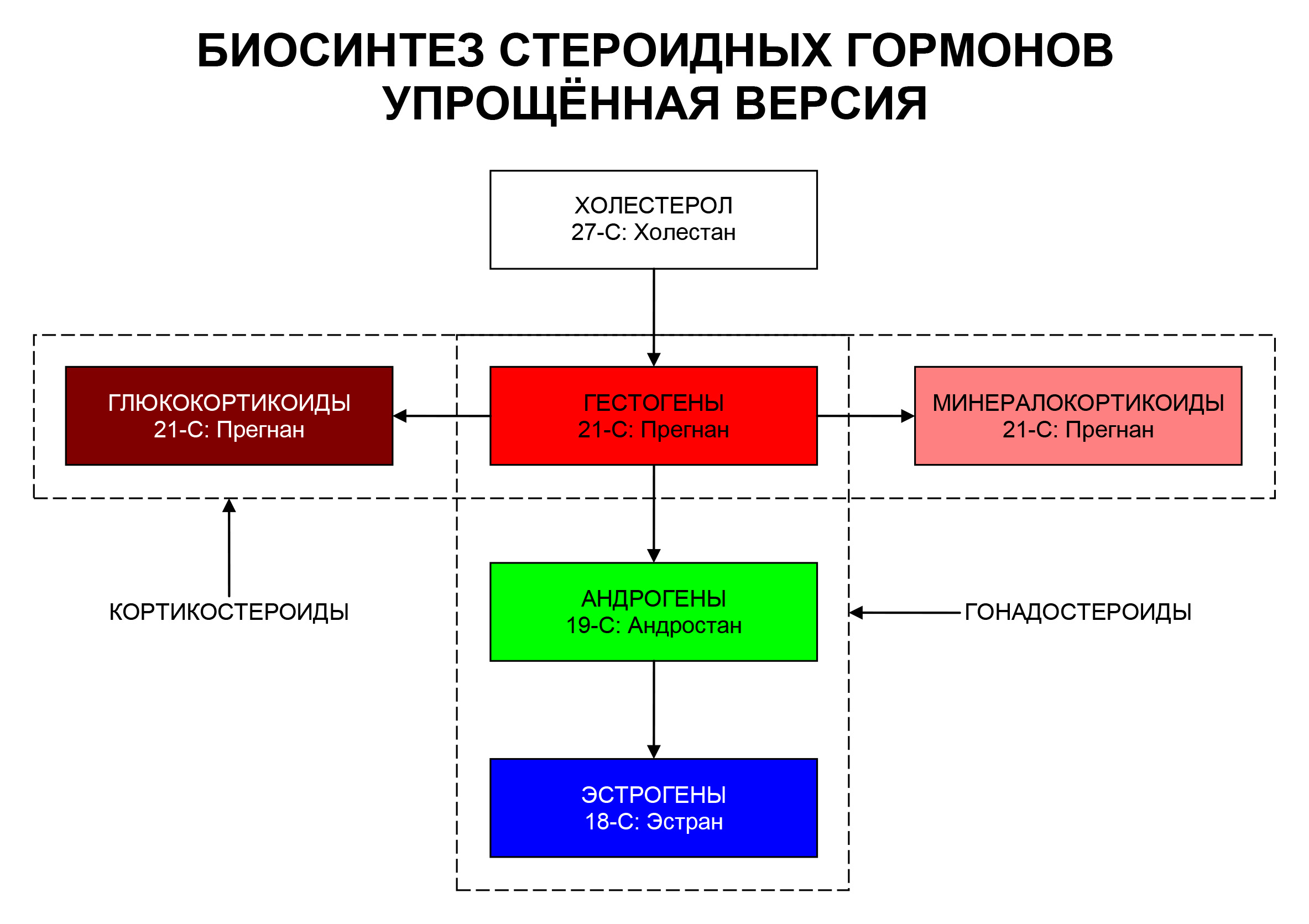 Упрощённая версия стероидогенеза. Показаны основные группы стероидных гормонов.